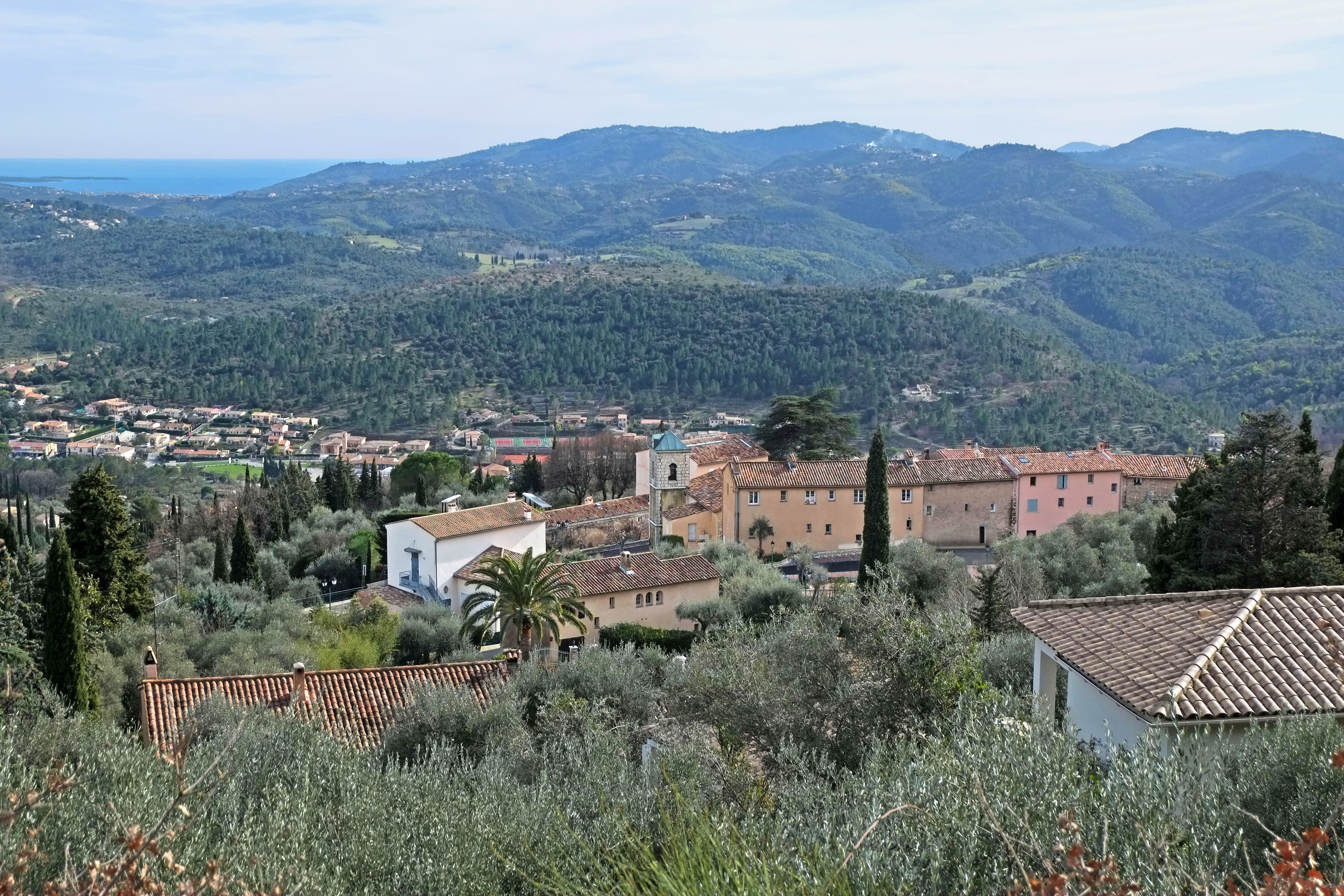 Vue du village du Tignet depuis une propriété du chemin de Léouvière